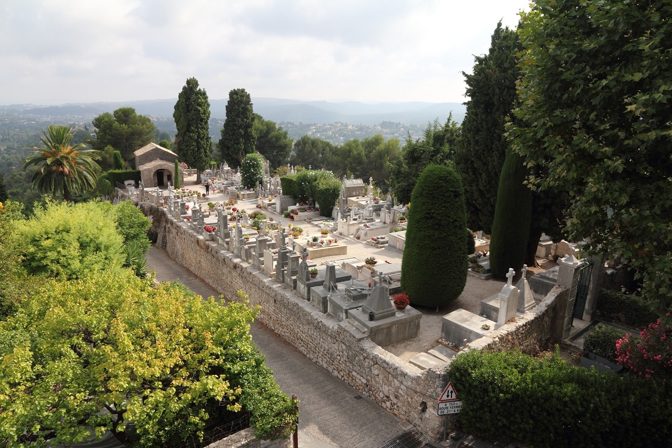 Cimetière de St-Paul-de-Vence en août 2012, PACA, France.